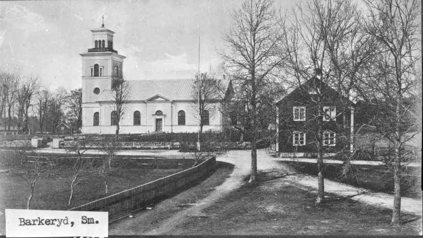 Kyrkan från söder. Kategori: (01) ExteriörerKyrkan från söder.